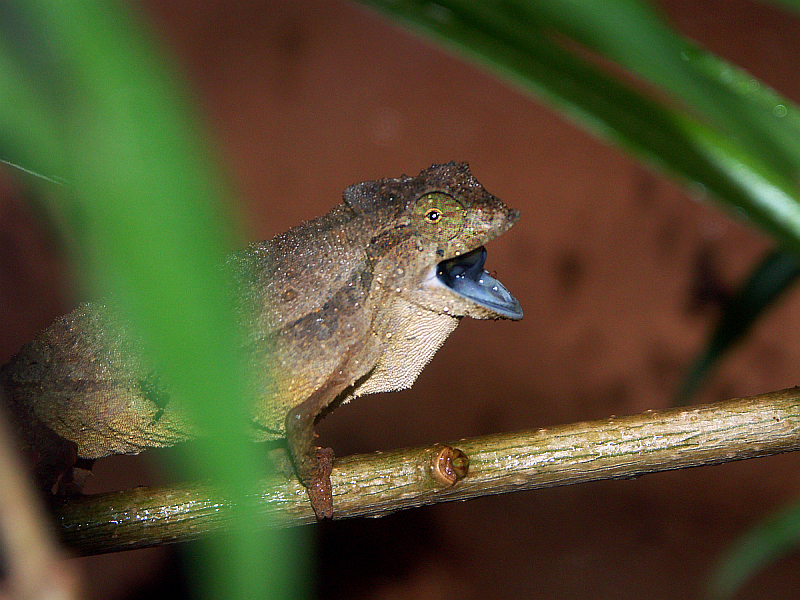 Rieppeleon brevicaudatus male eating